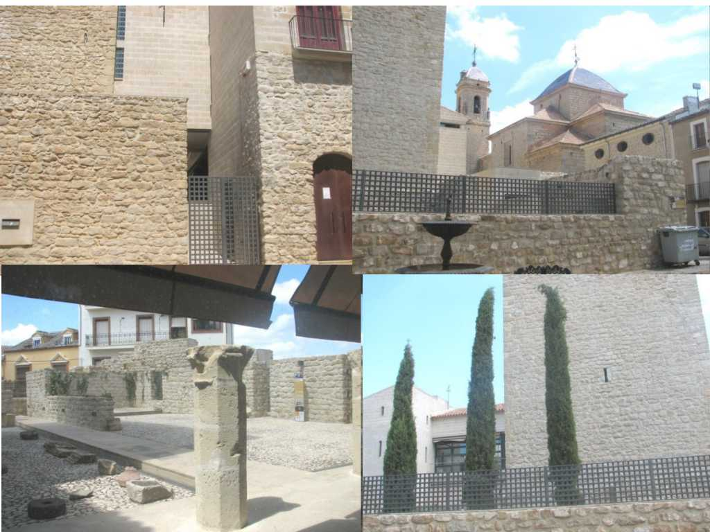 diversas vistas del entorno e interior del castillo y placio ducal de Castellar (Jaen)